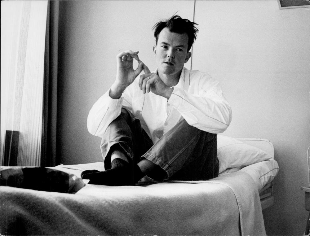 Foto på Jan Lindblad infört i Svenska Dagbladet 1967-03-25 sid 9.